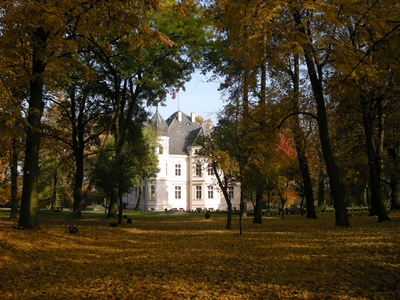 Pałac w Ziemiełowicach jesienią